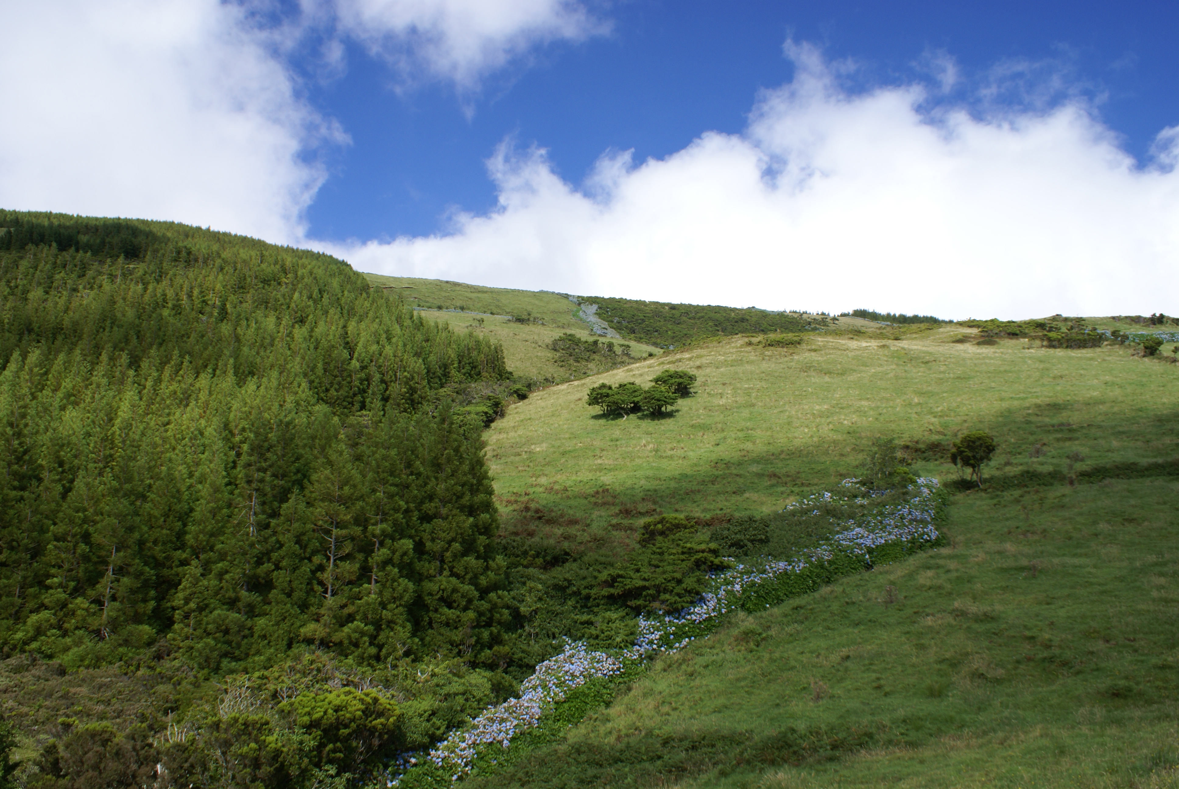 Serra do Topo, as montanhas e as pastagens sucedem-se junto à estrada que sobe a mais de 900 metros de altitude, Calheta, ilha de São Jorge, Açores